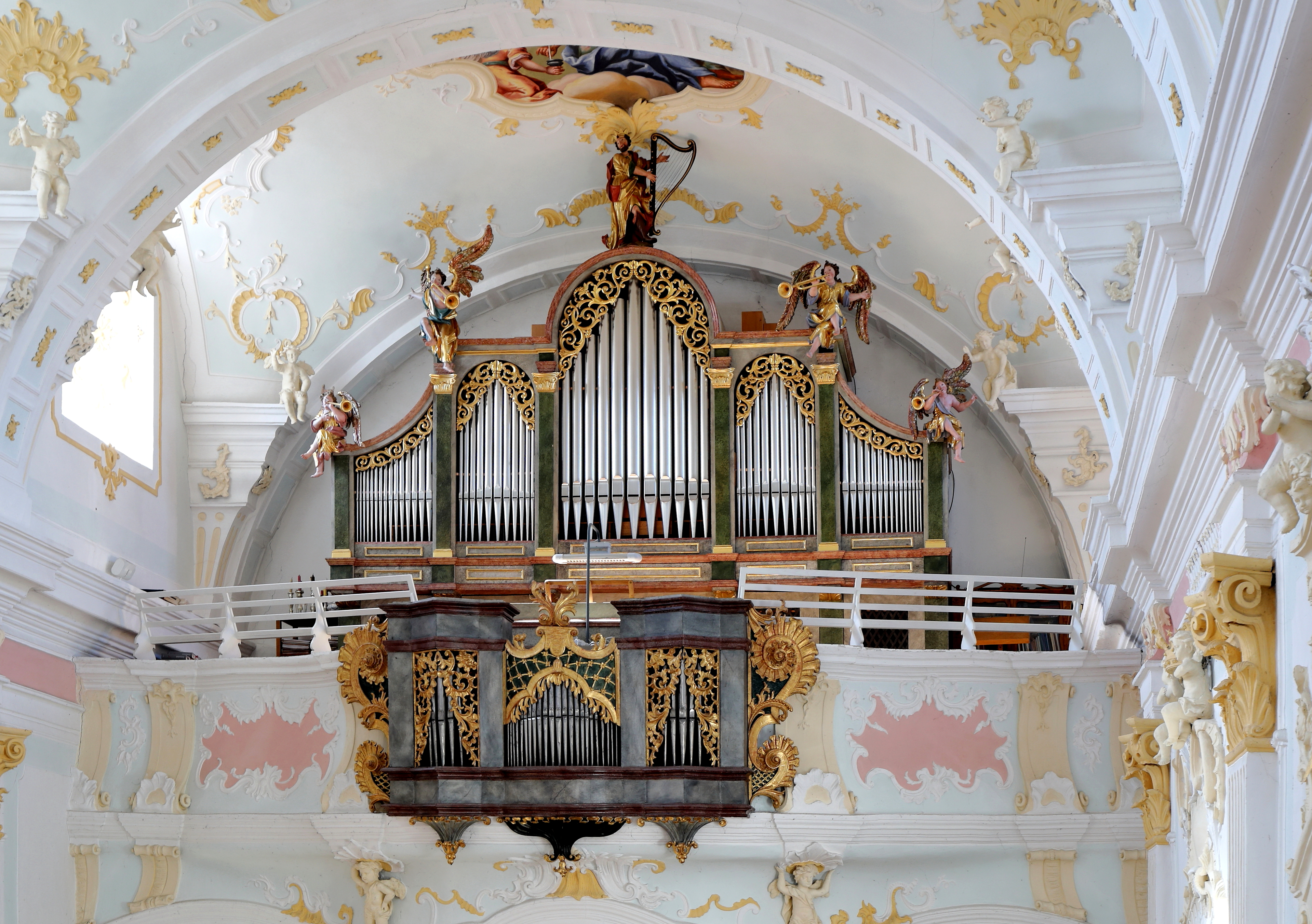 Die Orgel der Kaplaneikirche Kirchberg in der oberösterreichischen Marktgemeinde Kremsmünster. Die Orgel wurde ursprünglich 1682 von Leopold Freundt aus Passau als Stiftsorgel gebaut. 1855 verkaufte das Stift Kremsmünster die Orgel an die Kaplaneikirche Kirchberg. Der Orgelbauer Ludwig Mooser wurde beauftragt, die Freundt-Orgel abzutragen und an die Gegebenheiten in Kirchberg anzupassen. Dabei wurde ein neues Gehäuse im Stil der Salzburger Domorgel angefertigt, die er ebenfalls umgebaut hatte. Im Jahr 2002 wurde das Instrument von der Firma Orgelbau Kögler umfangreich restauriert.